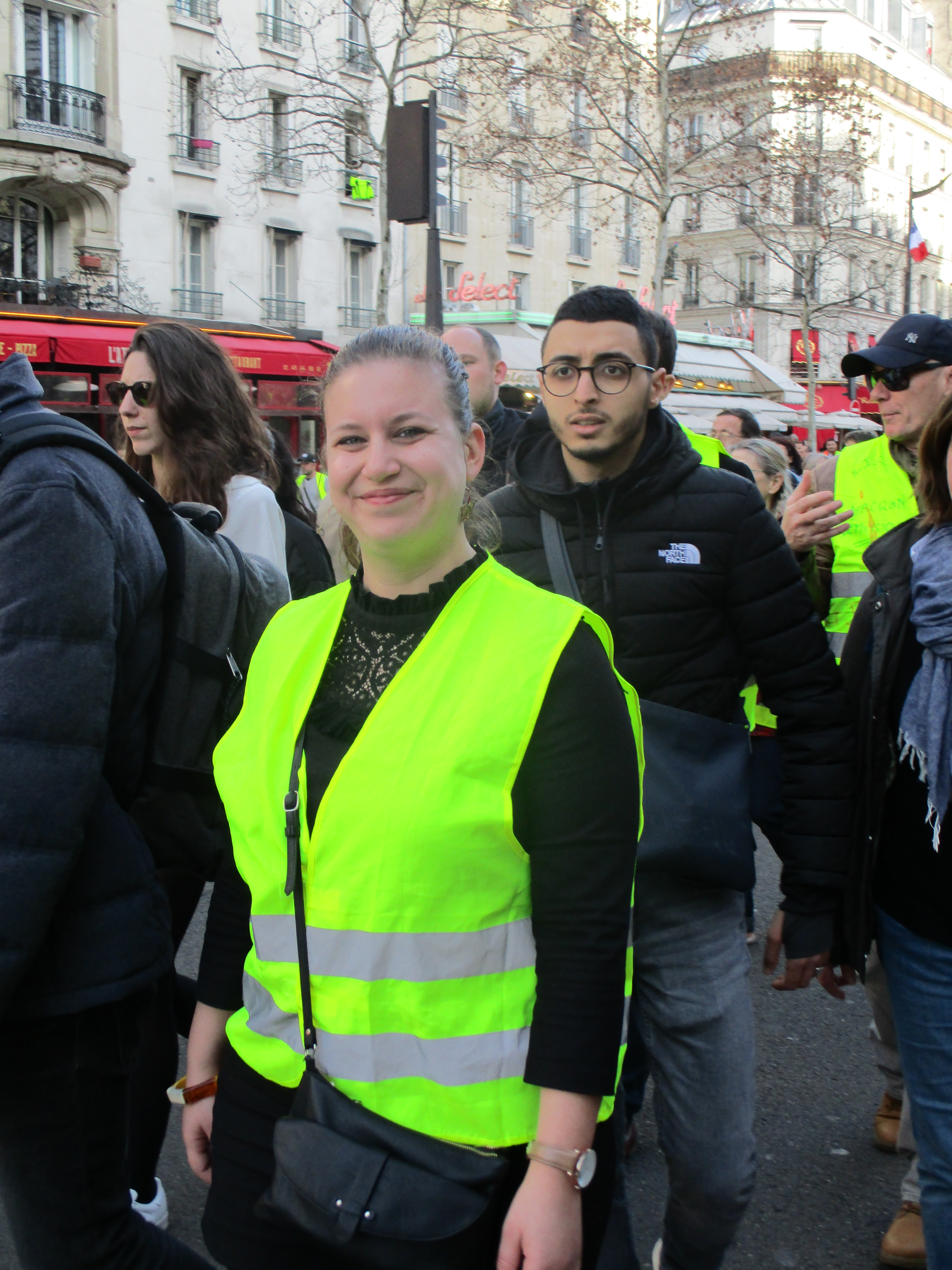 La députée Mathilde Panot pendant la manifestation des gilets jaunes du 16 février 2019 à Paris, boulevard Montparnasse.